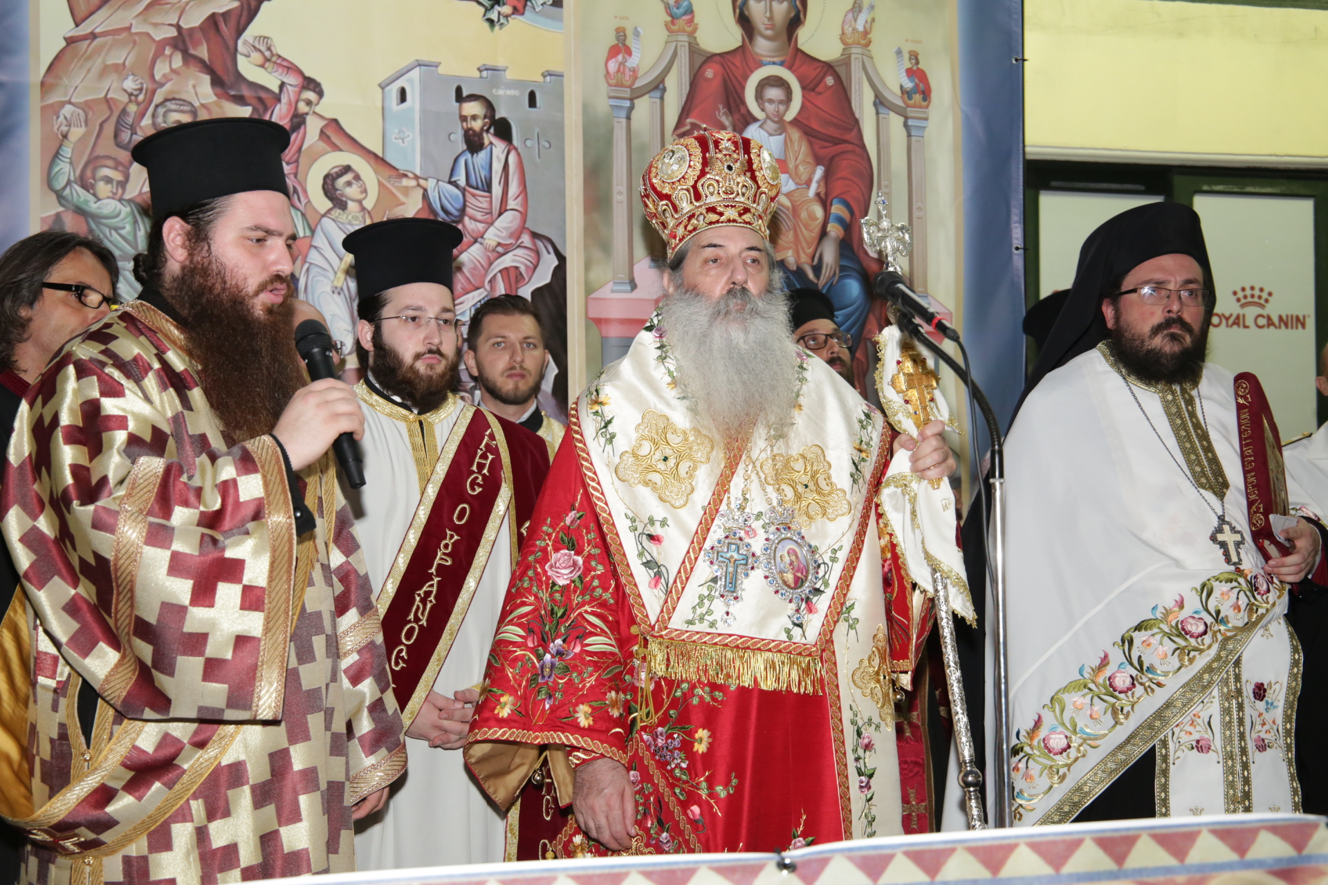 Στιγμιότυπο από ακολουθία Ιεράς Πανηγύρεως το καλοκαίρι του 2018